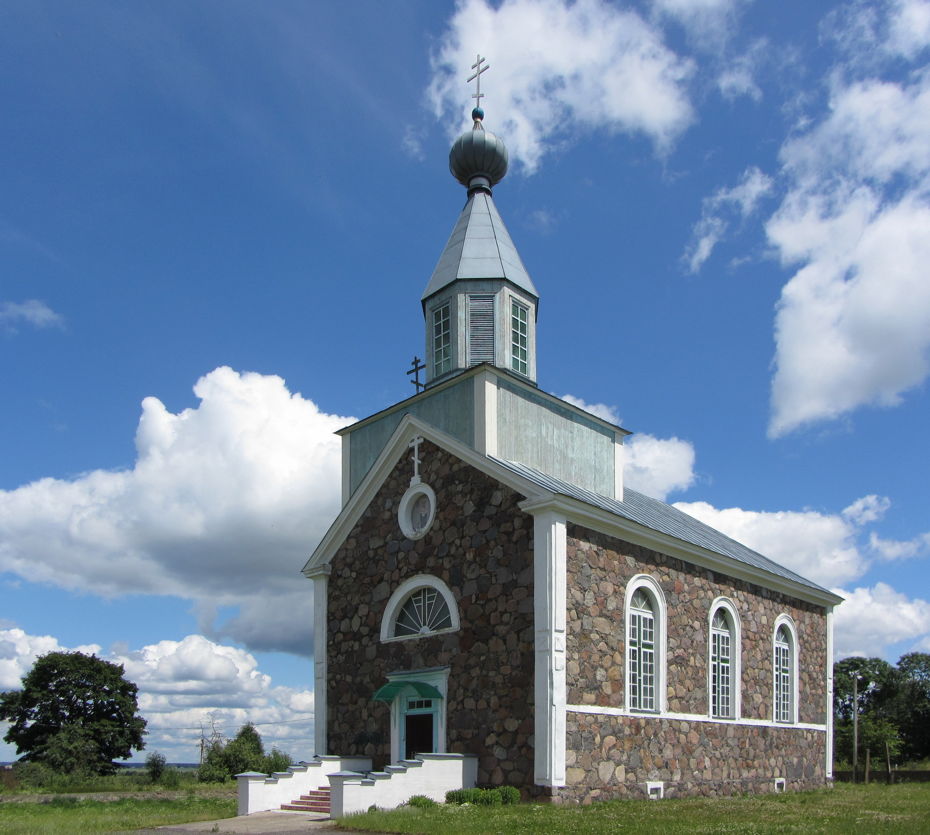 Беларуская (тарашкевіца): Царква Покрыва Прасьвятой Багародзіцы (1886) у вёсцы Беніца